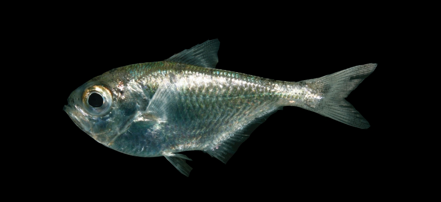 Pempheris gasparinii, isla de Trindade, Brasil